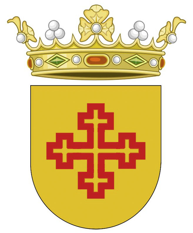 Escudo de armas del Marquesado de Vessolla